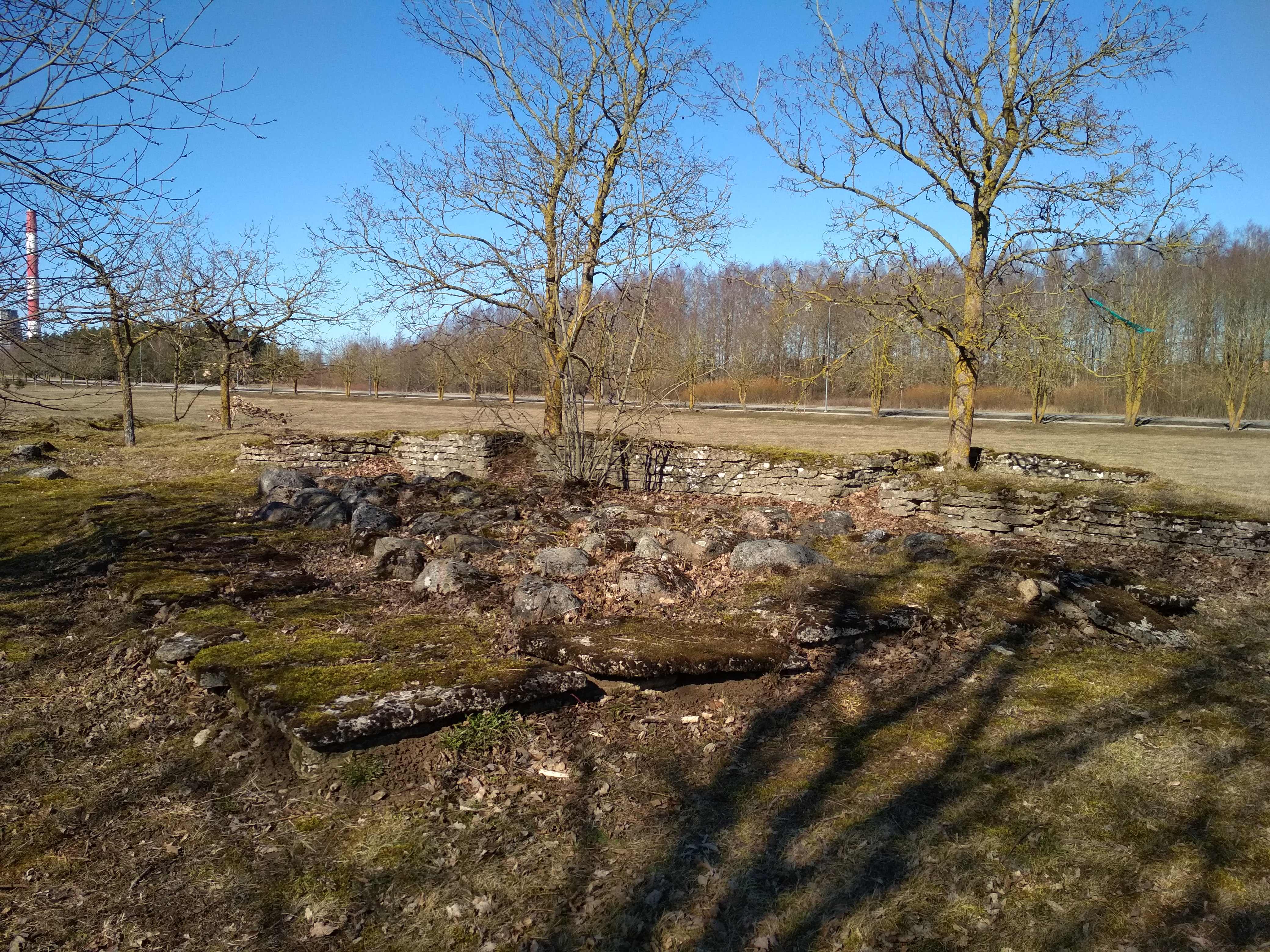 Taastatud tarandkalme Proosa kalmerühmas (Loo alevik)